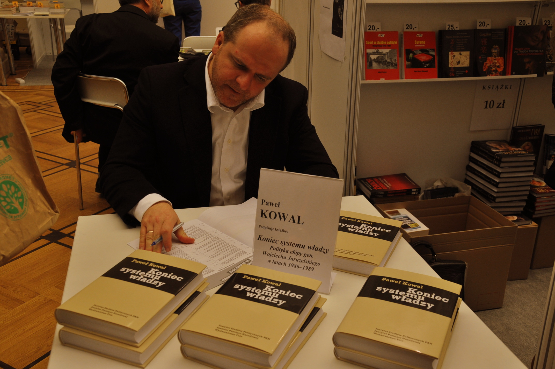 Paweł Kowal podpisuje swoją książkę na III Warszawskich Targach Książki